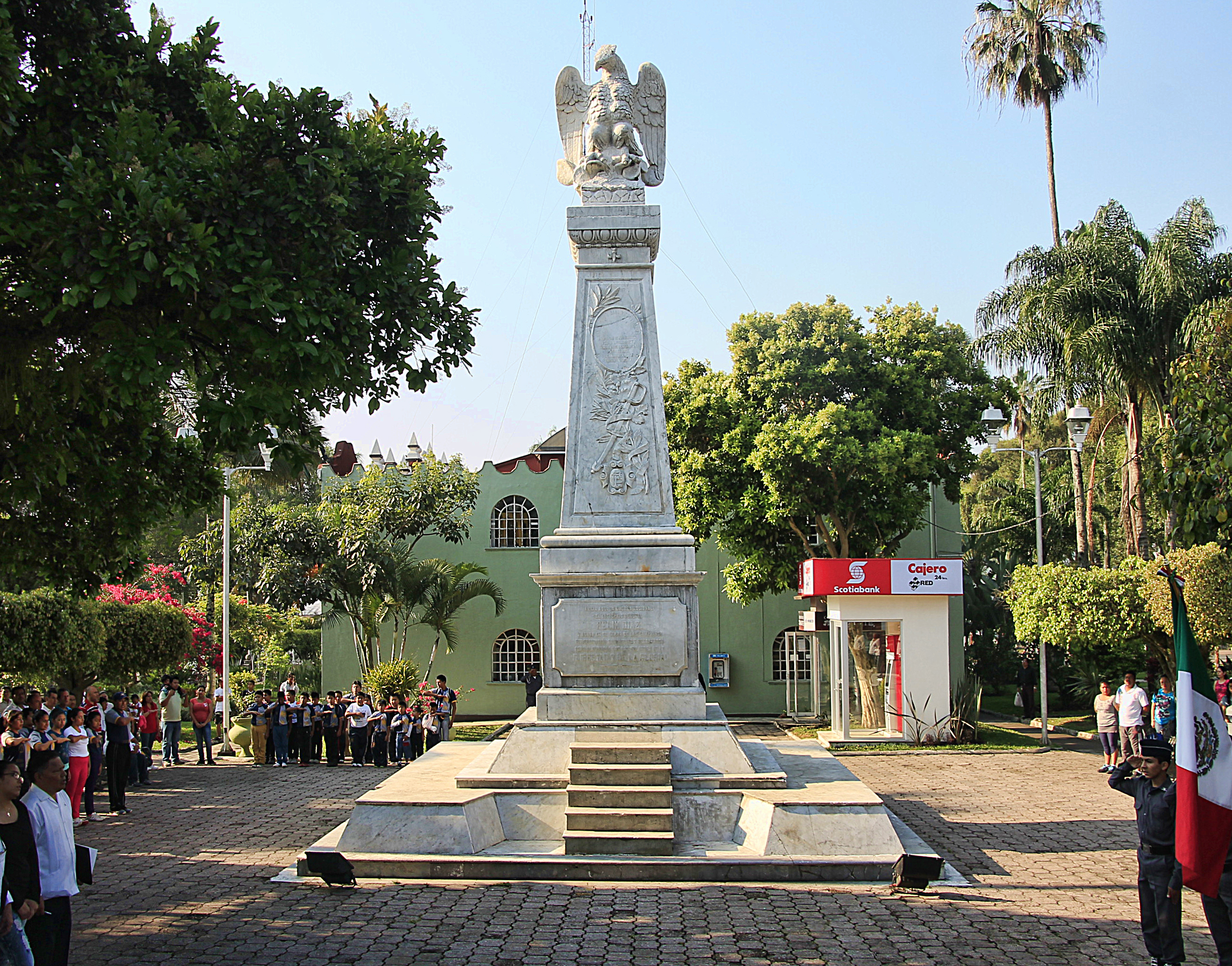 Monumento de El Aguila en la ciudad de Fortin que conmemora la primera batalla entre los ejercitos franceses y mexicanos, librada el 19 de abril de 1862